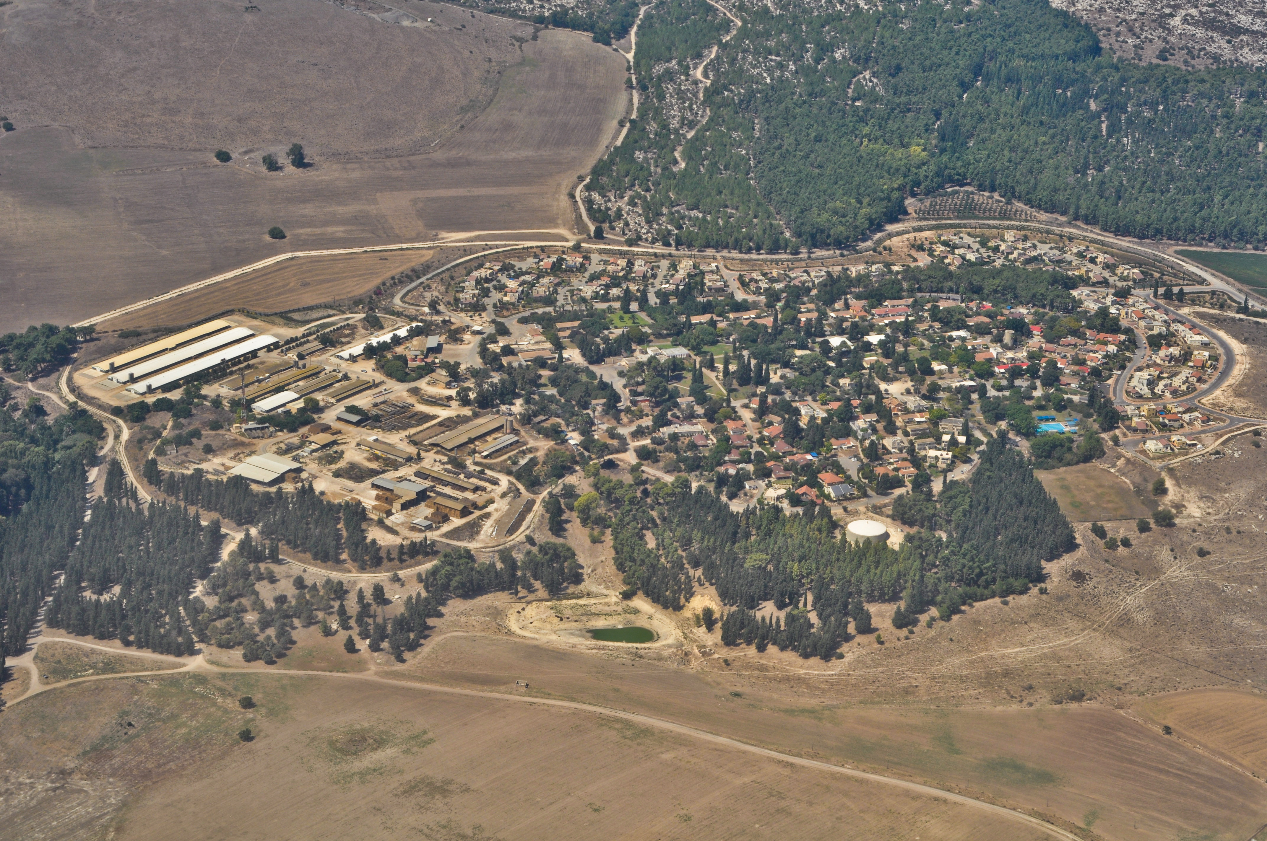 קיבוץ מגידו